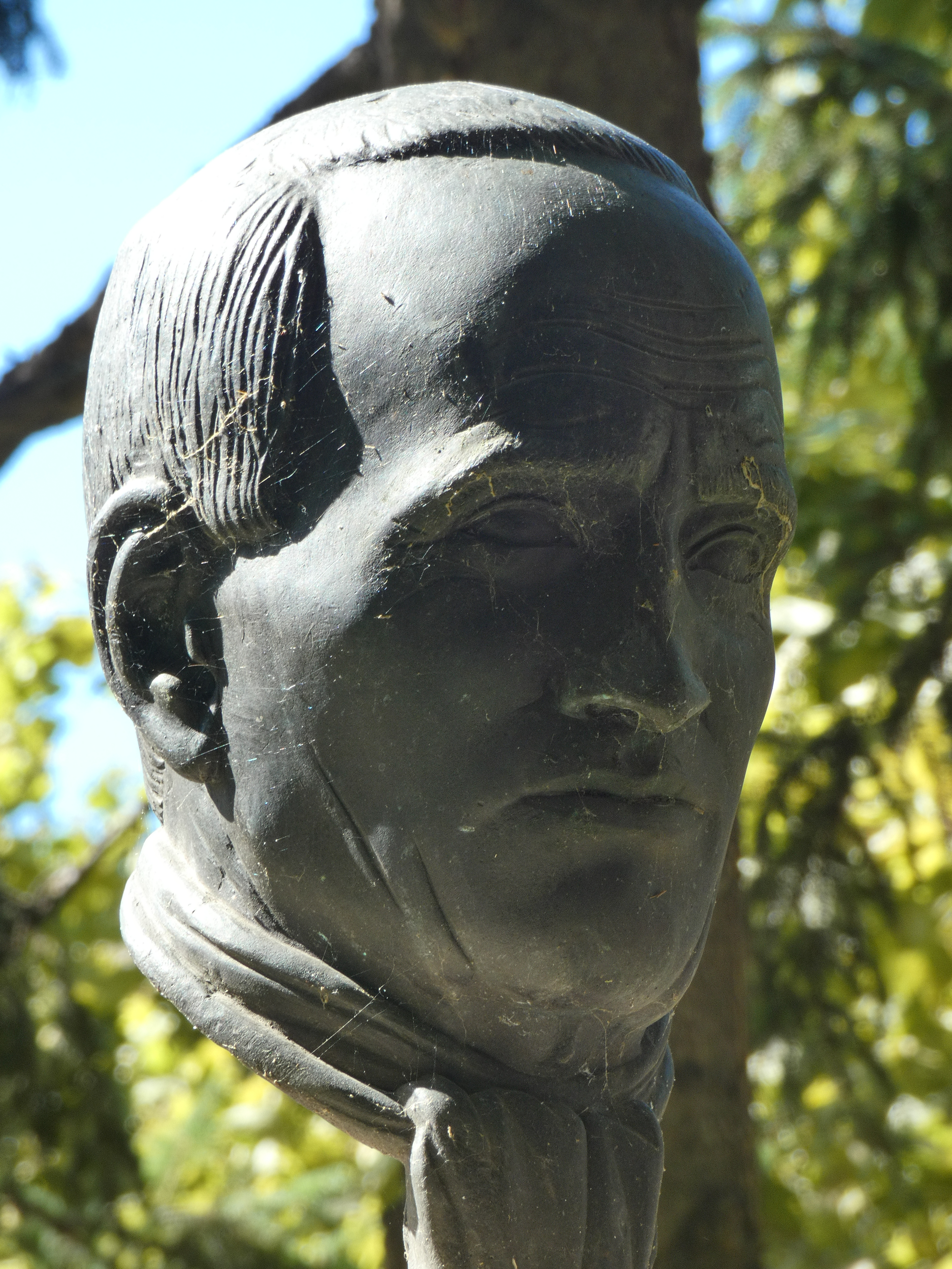 Doctor Zubia